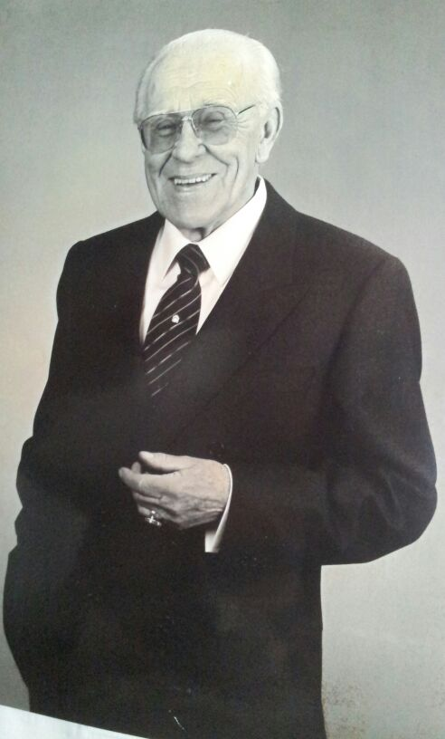 Erich Kapitzke, 85-jährig mit Schinkel-Ring